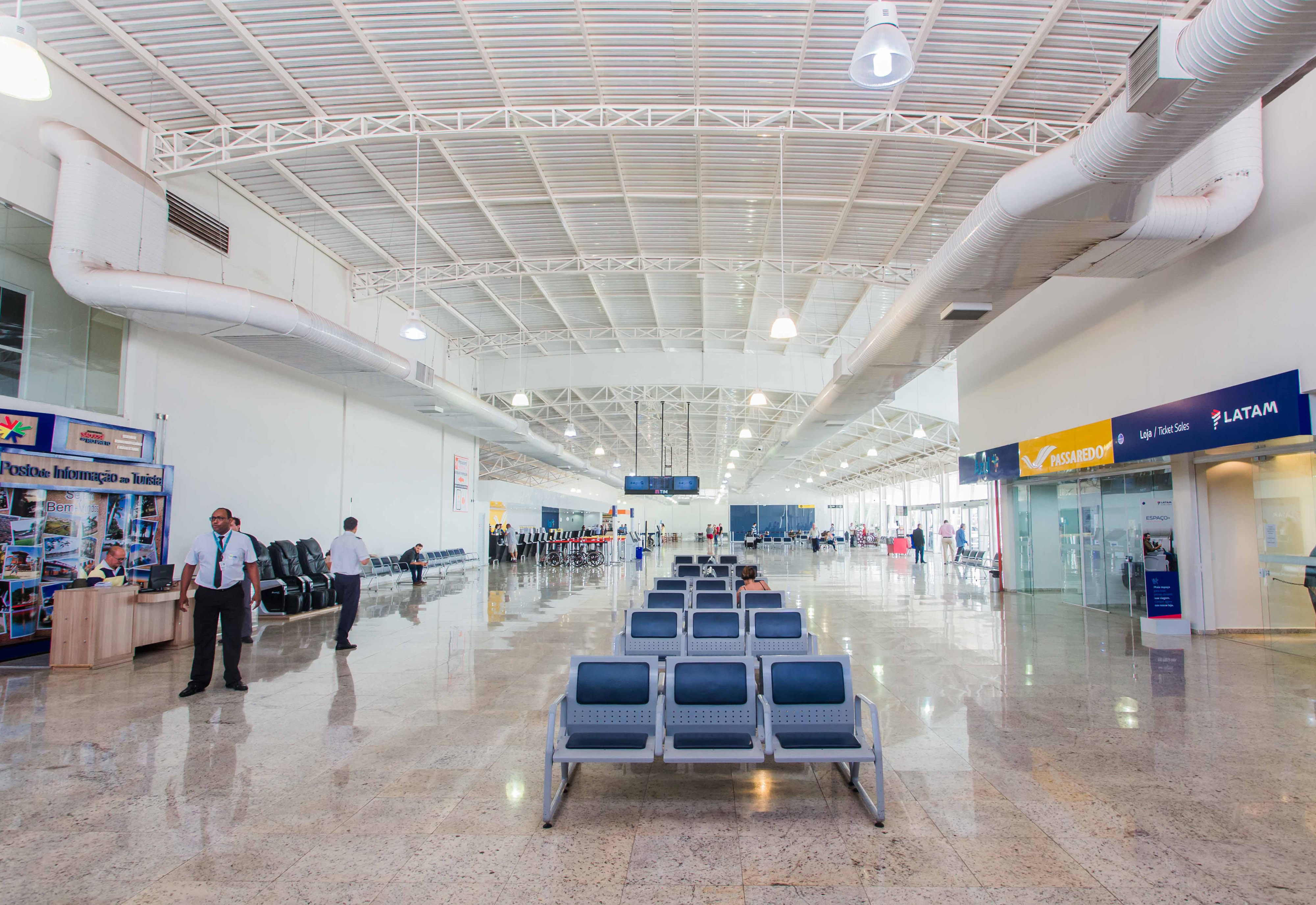 O Governador do Estado de São Paulo, Geraldo Alckmin, participou da Inauguração da ampliação e reforma do Terminal de Passageiros e do estacionamento do Aeroporto de São José do Rio Preto. Local: São José do Rio Preto/SP. Data: 16/11/2017. Foto: Alexandre Carvalho/A2img